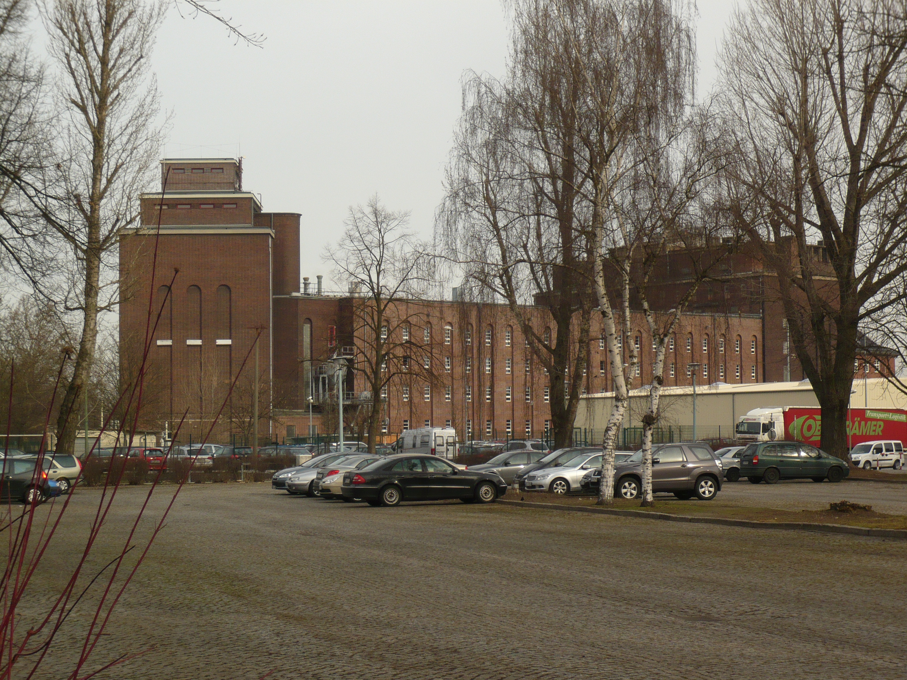 Berlin-Alt-Hohenschönhausen; Indira Gandhi-Straße, Blick auf die eh. Kindl-Brauerei